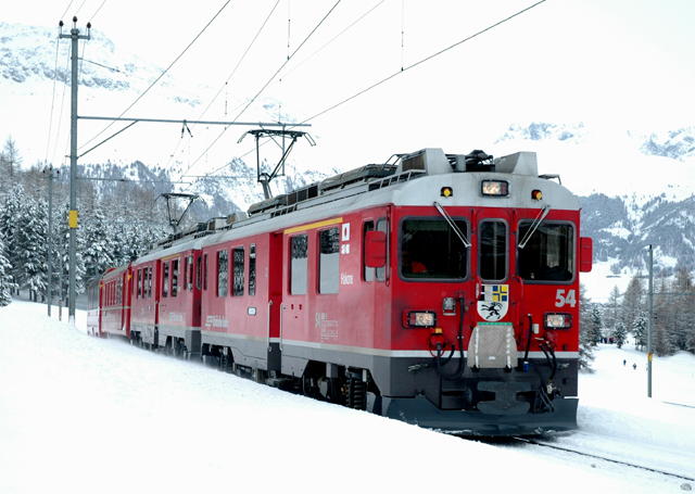 Rhätische Bahn motorrijtuigen ABe 4/4III nr: 54 en 53 met onder meer een Bernina-Express rijtuig bij Pontresina.